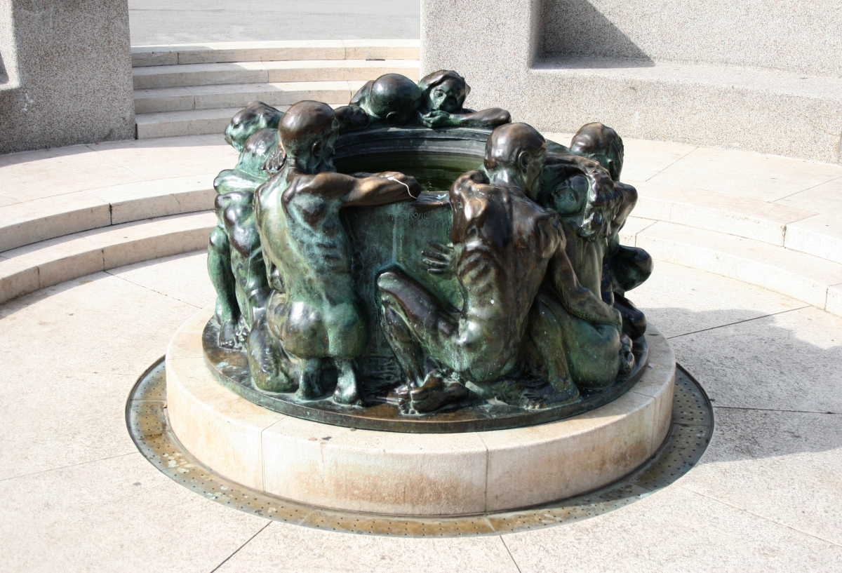 Zdenac života, rad Ivana Meštrovića u Zagrebu